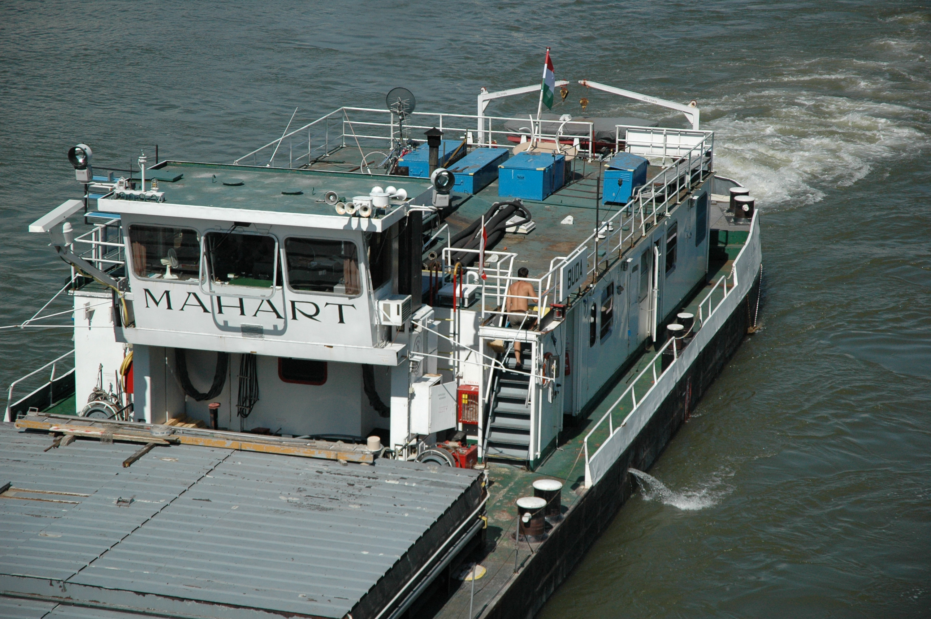 Frachtschiff der ungarischen "Mahart Passnave"-Reederei auf der Donau in Linz, Österreich (cargo ship of the hungarian "Mahart Passnave" company on the Danube river in Linz, Austria)